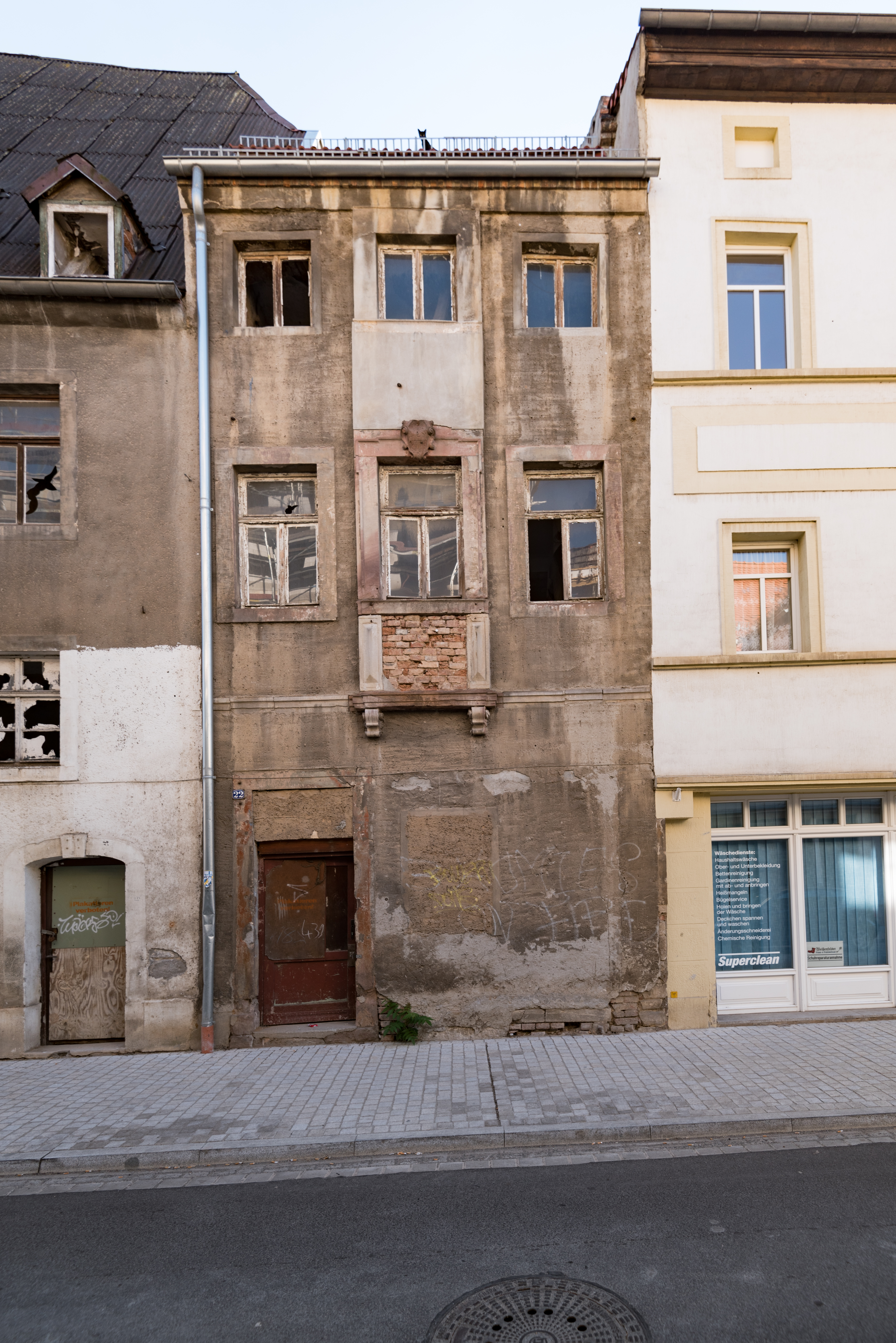 Weißenfels, Saalstraße 22